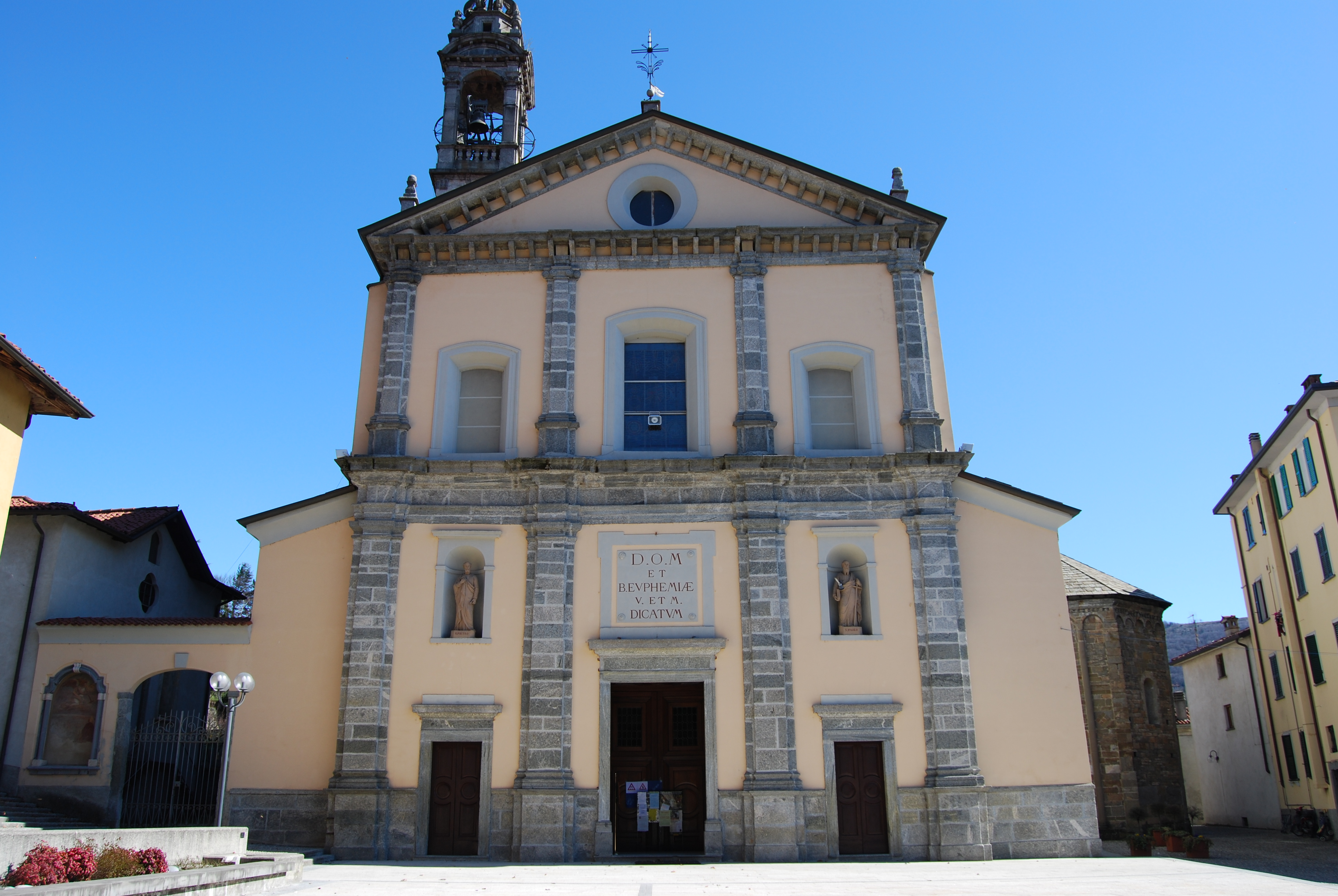 Chiesa Prepositurale dedicata a Sant'Eufemia, patrona di Oggiono